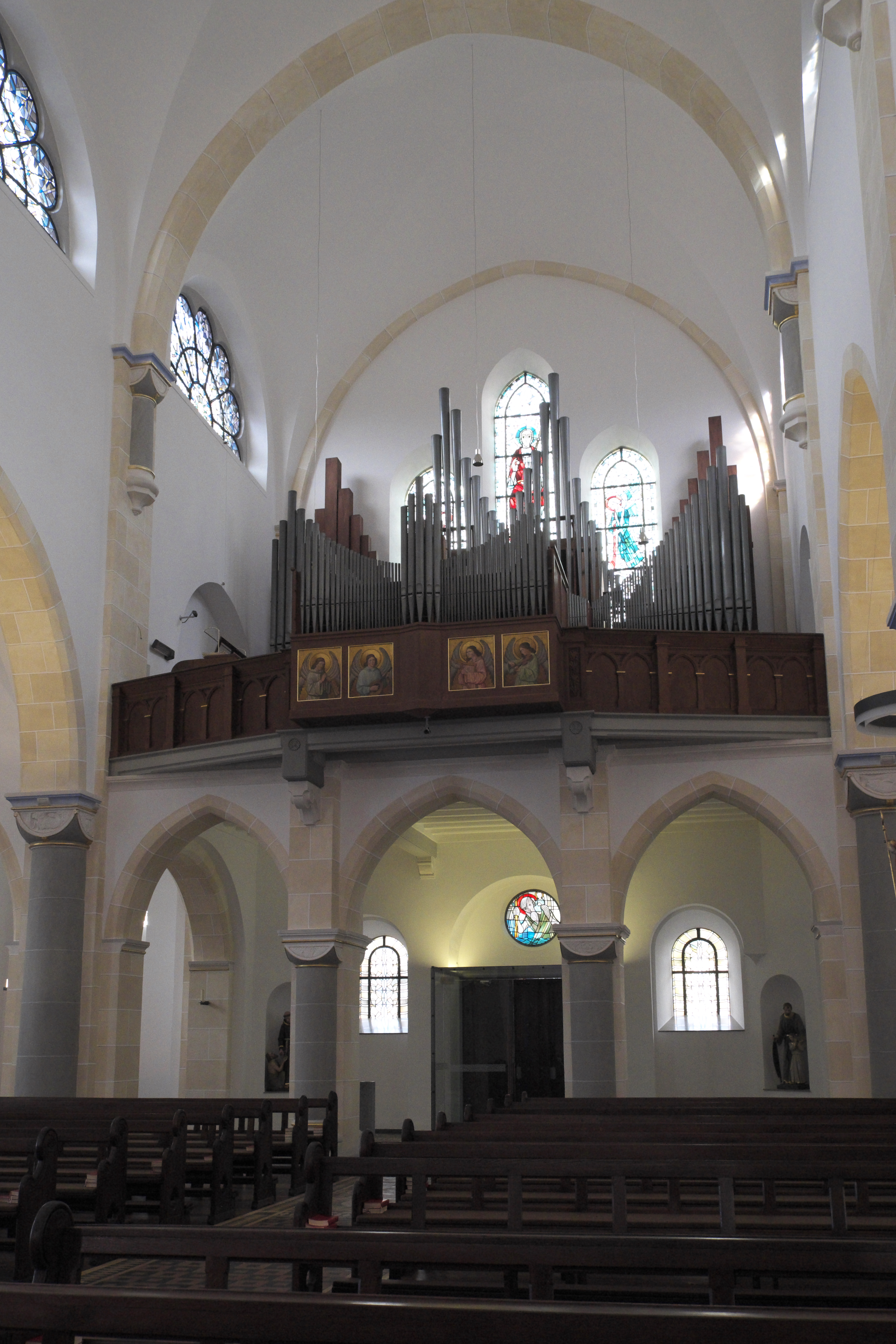 Katholische Pfarrkirche St. Alexander in Schmallenberg im Hochsauerlandkreis (Nordrhein-Westfalen), Orgelempore